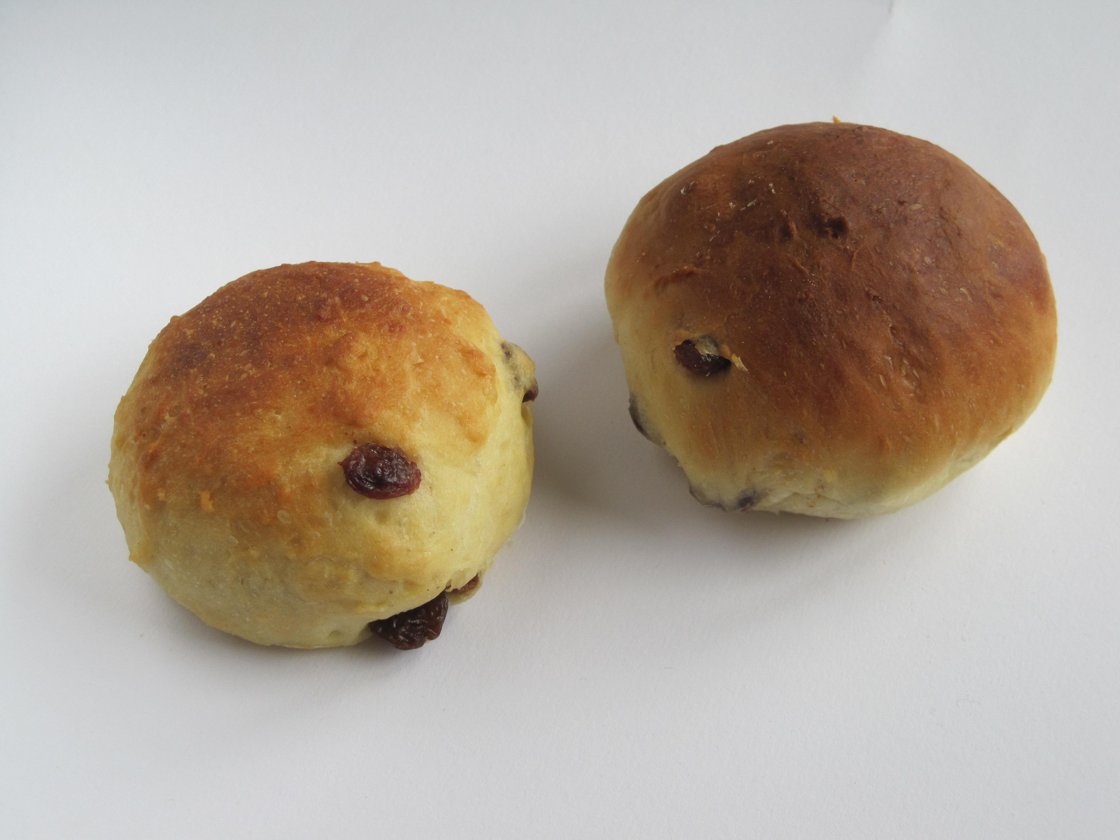 Rosinenbrötchen